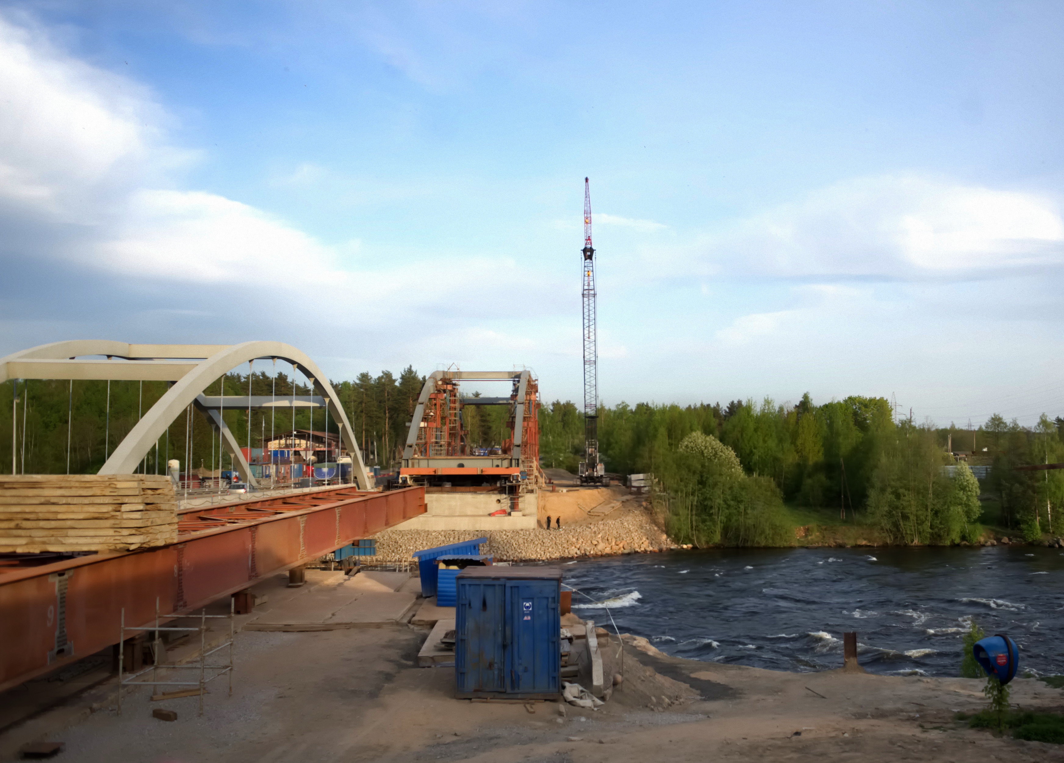 Kiviniemen silta, toukokuu 2016